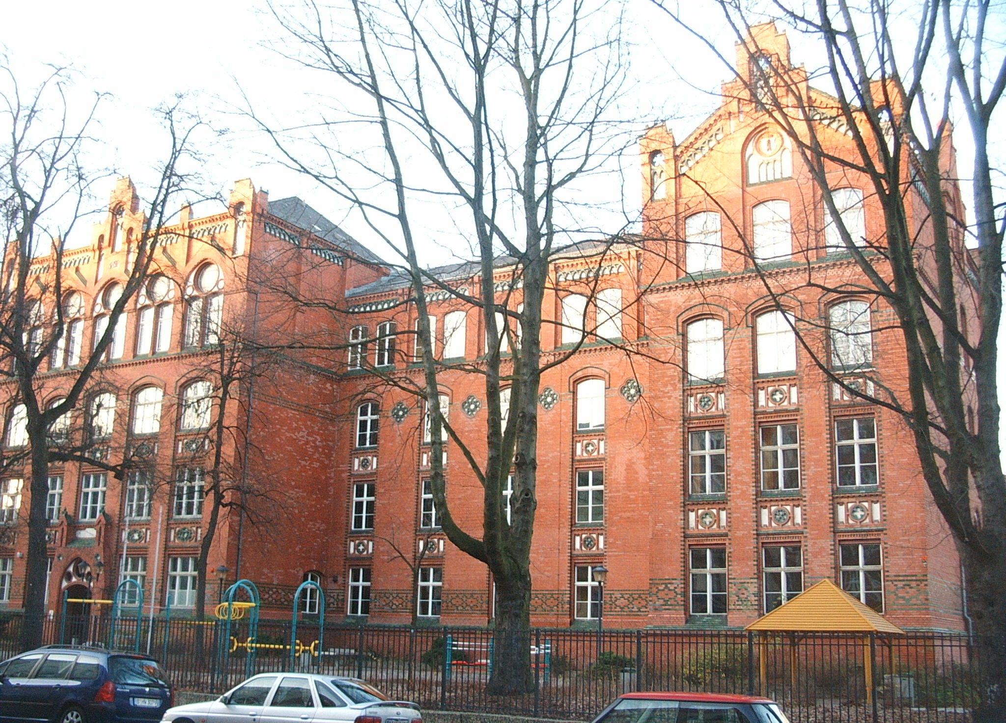 Schule am Zille-Park, ehemals Theodor-Plievier-Oberschule, Berlin